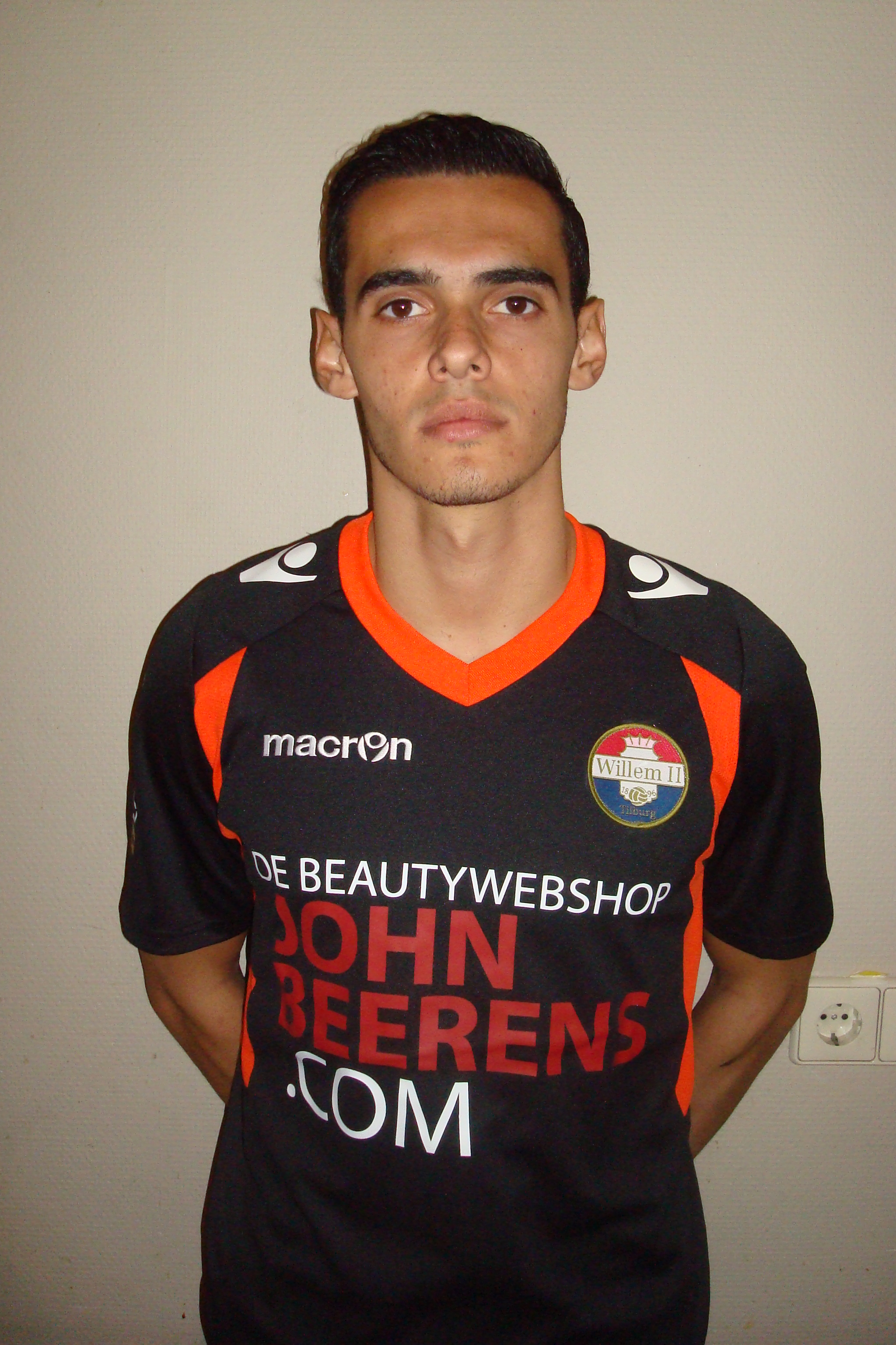 Renan Zanelli in het shirt van Willem II seizoen 2013/2014